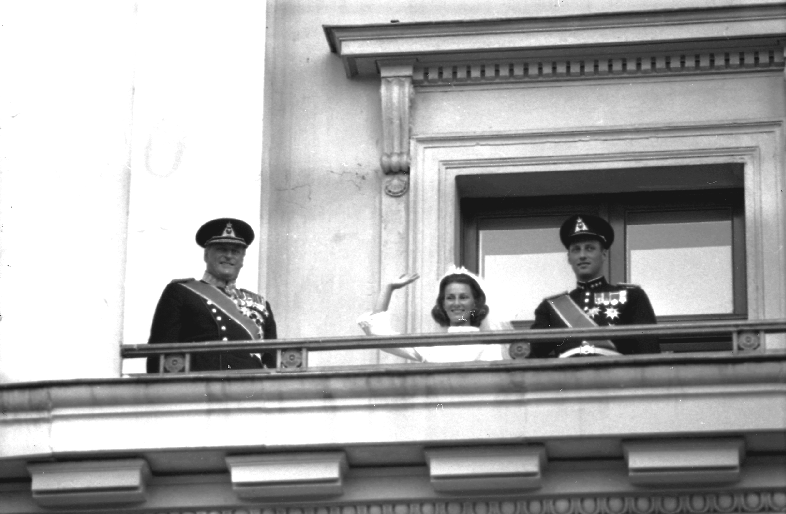 Foto: Bjørn Glorvigen, Billedbladet NÅ. År: 1968 Arkivreferanse: Riksarkivet, PA797 4718A 8 010 Url